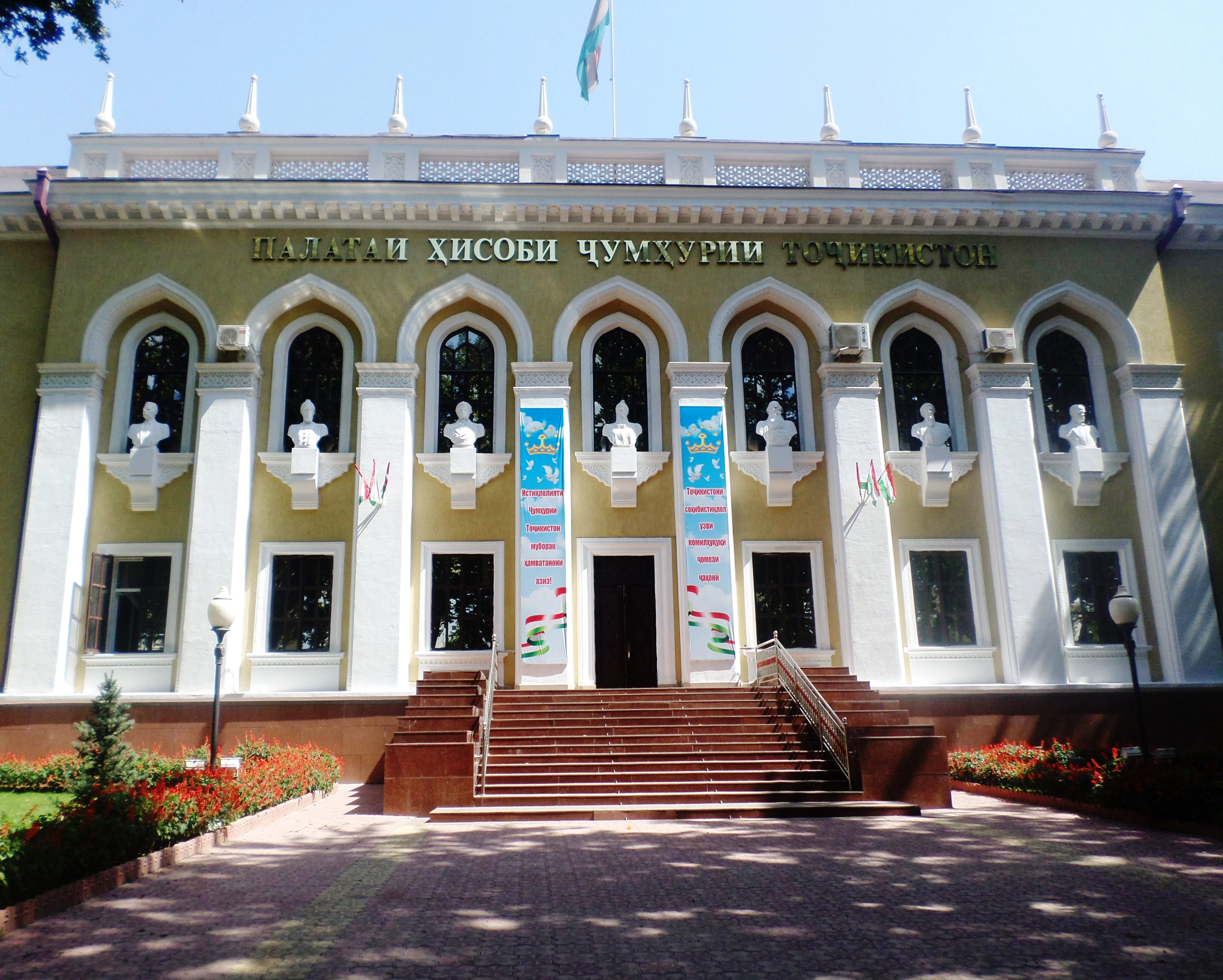 Здание Счётной палаты Республики Таджикистан (бывшая библиотека им. А. Фирдоуси) в г. Душанбе